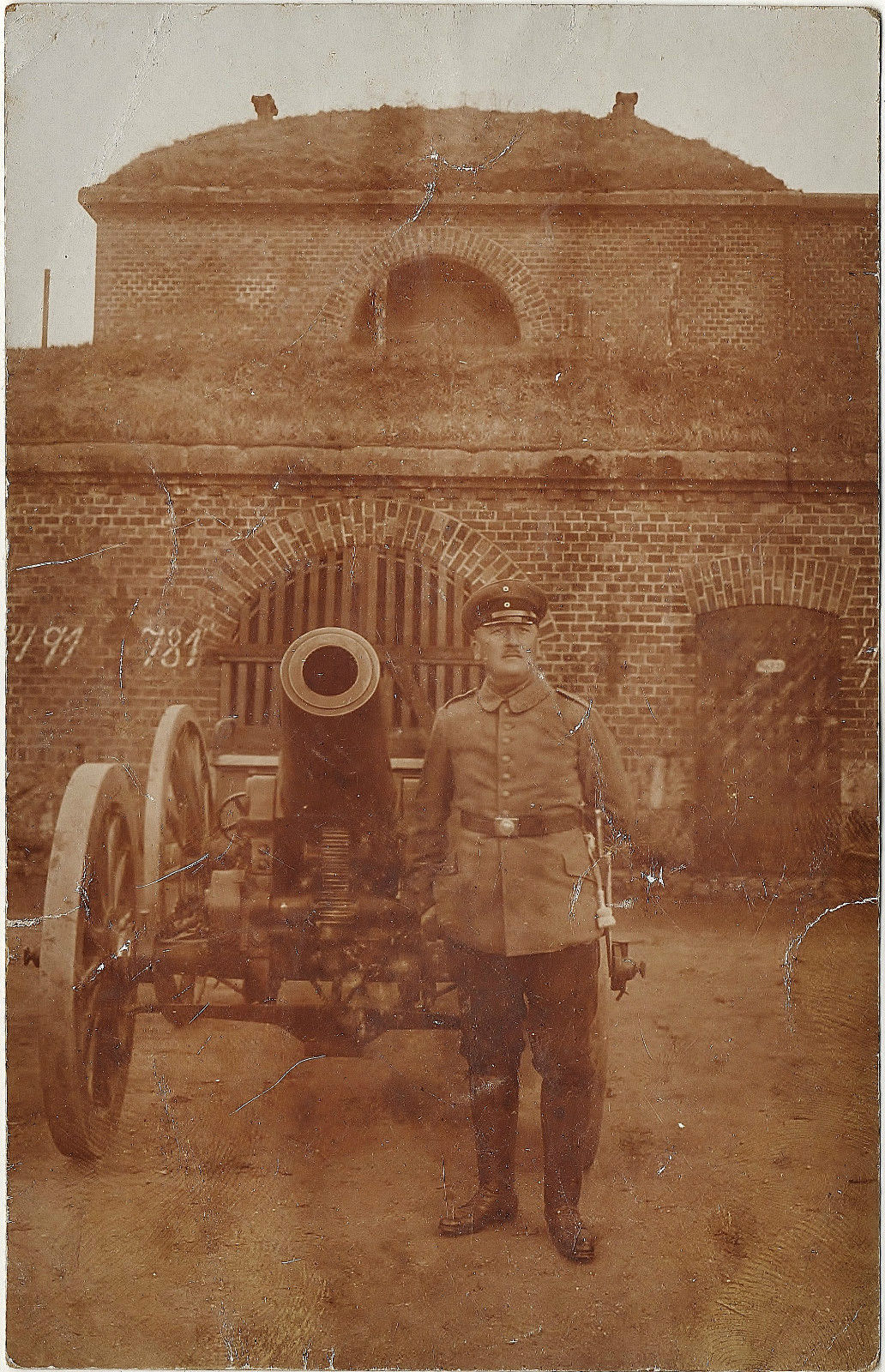 Karaliaučiaus tvirtovė: 4-ojo rezervinio sunkiosios artilerijos pulko karys ir pabūklas tvirtovės forte